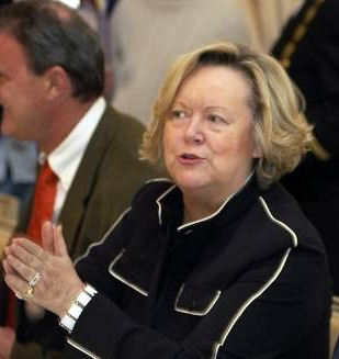 Anne Marie Lizin au Sénat